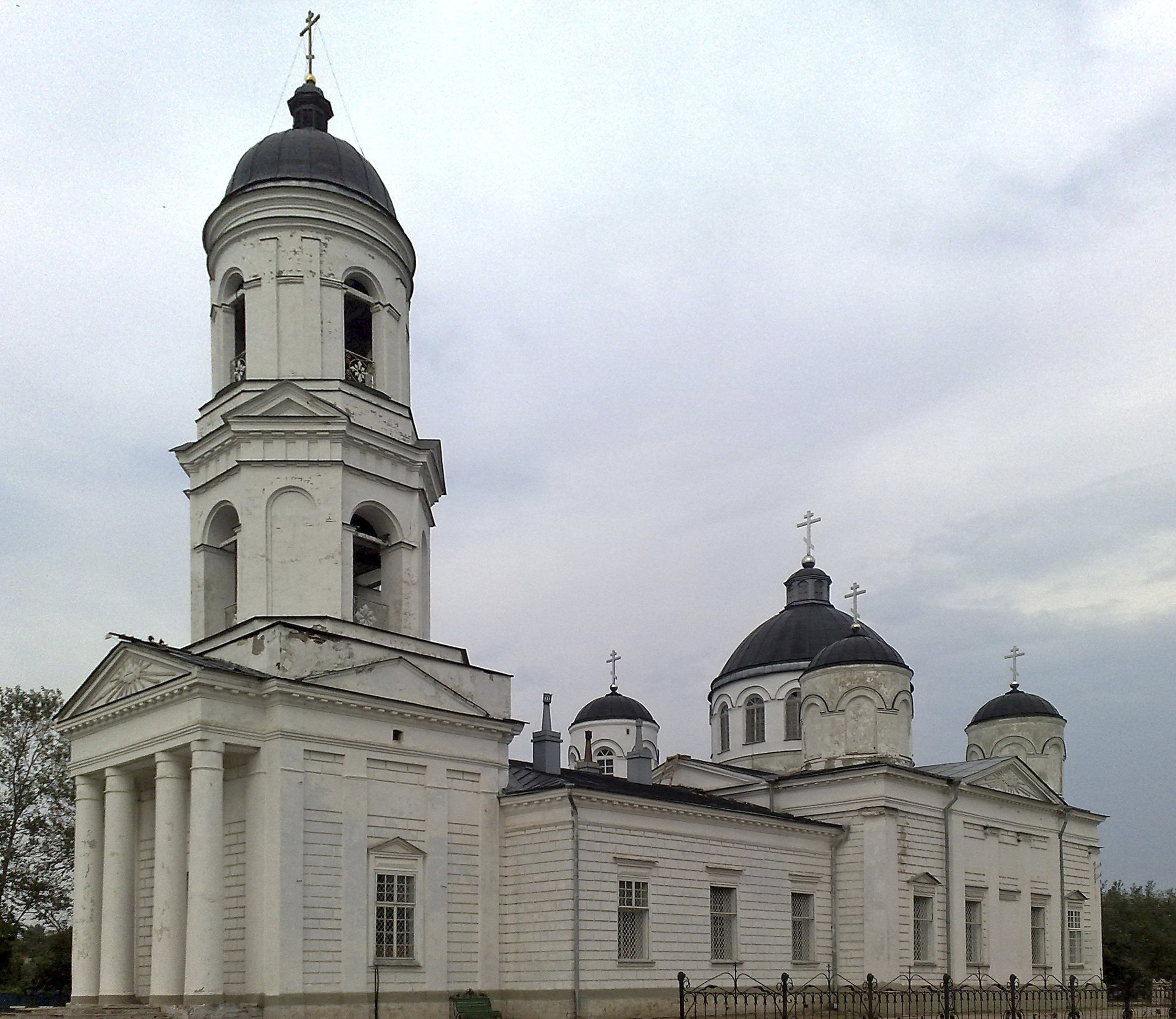 Ильинский собор в городе Сольцы Новгородской области